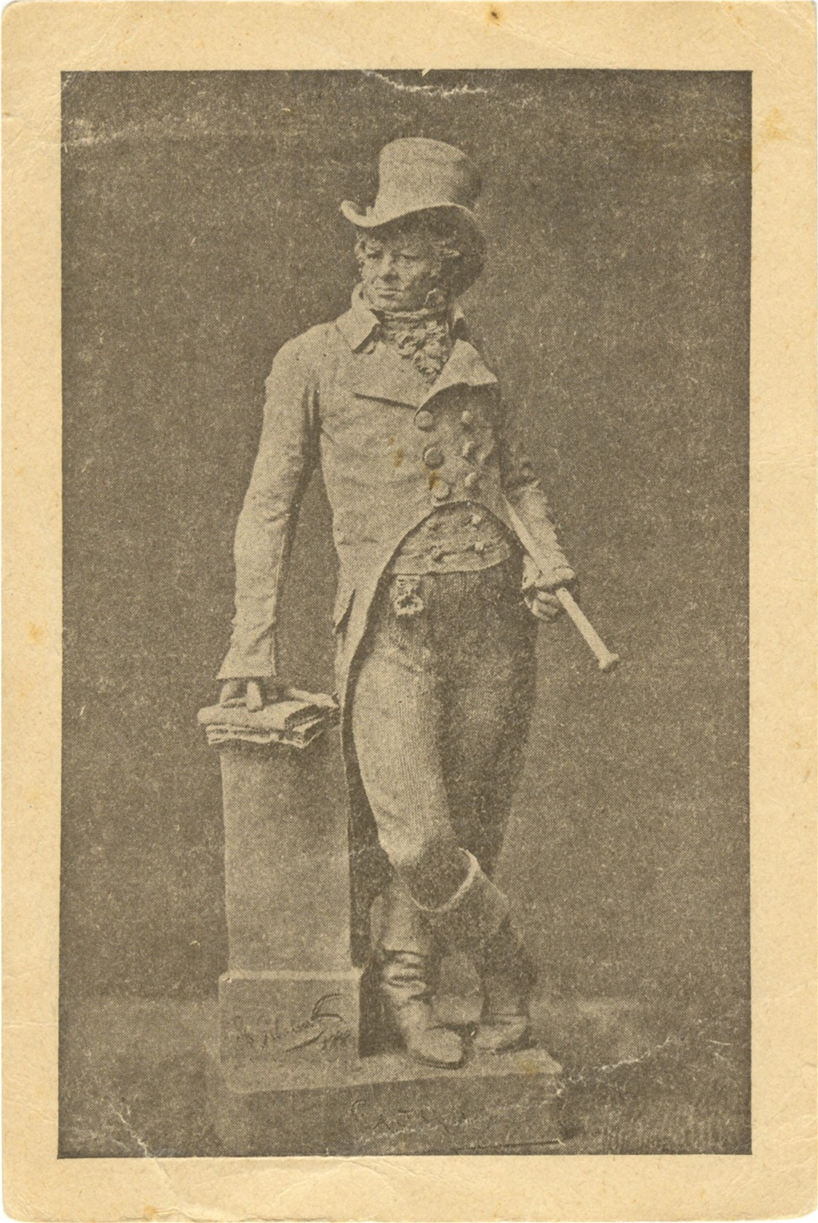 Tarjeta de visita de Luis Gilabert Ponce, Escultor Anatómico de la Facultad de Medicina de Valencia, con la imagen que reproduce la estatuilla de Goya creada en 1880